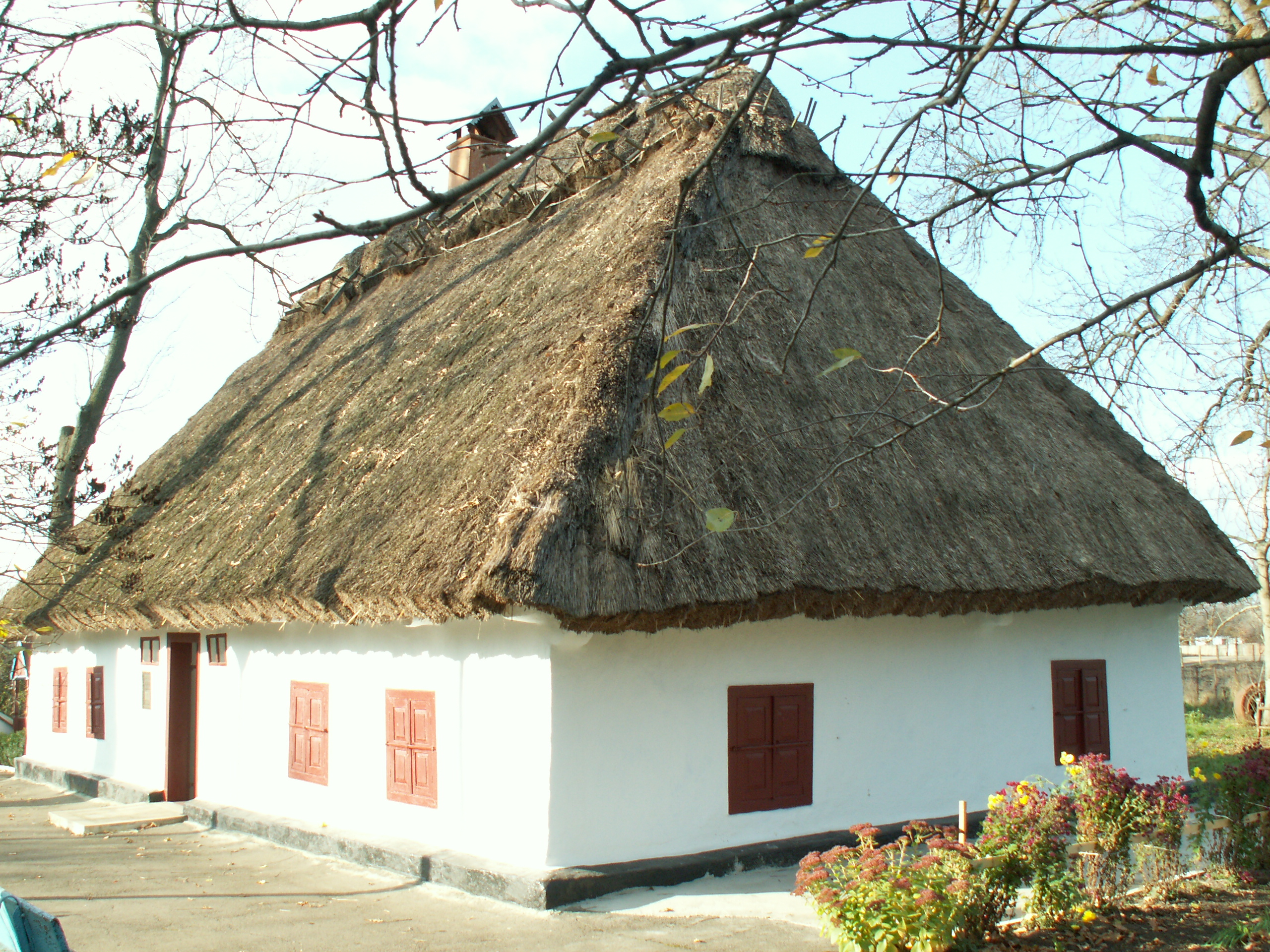 Doc Zabolotny Museum Zabolotne Ukraine